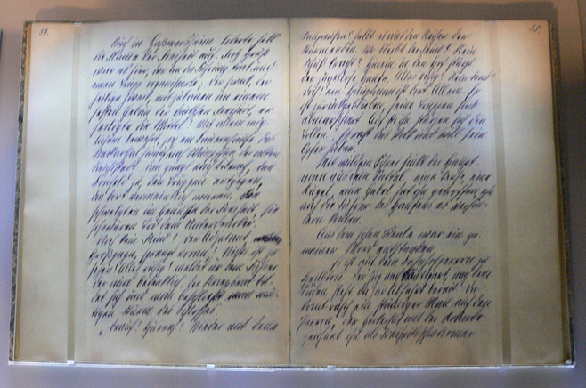 Schulaufsatz von Theodor Heuss von 1898 (über die Revolution 1848/49); Theodor-Heuss-Haus Stuttgart